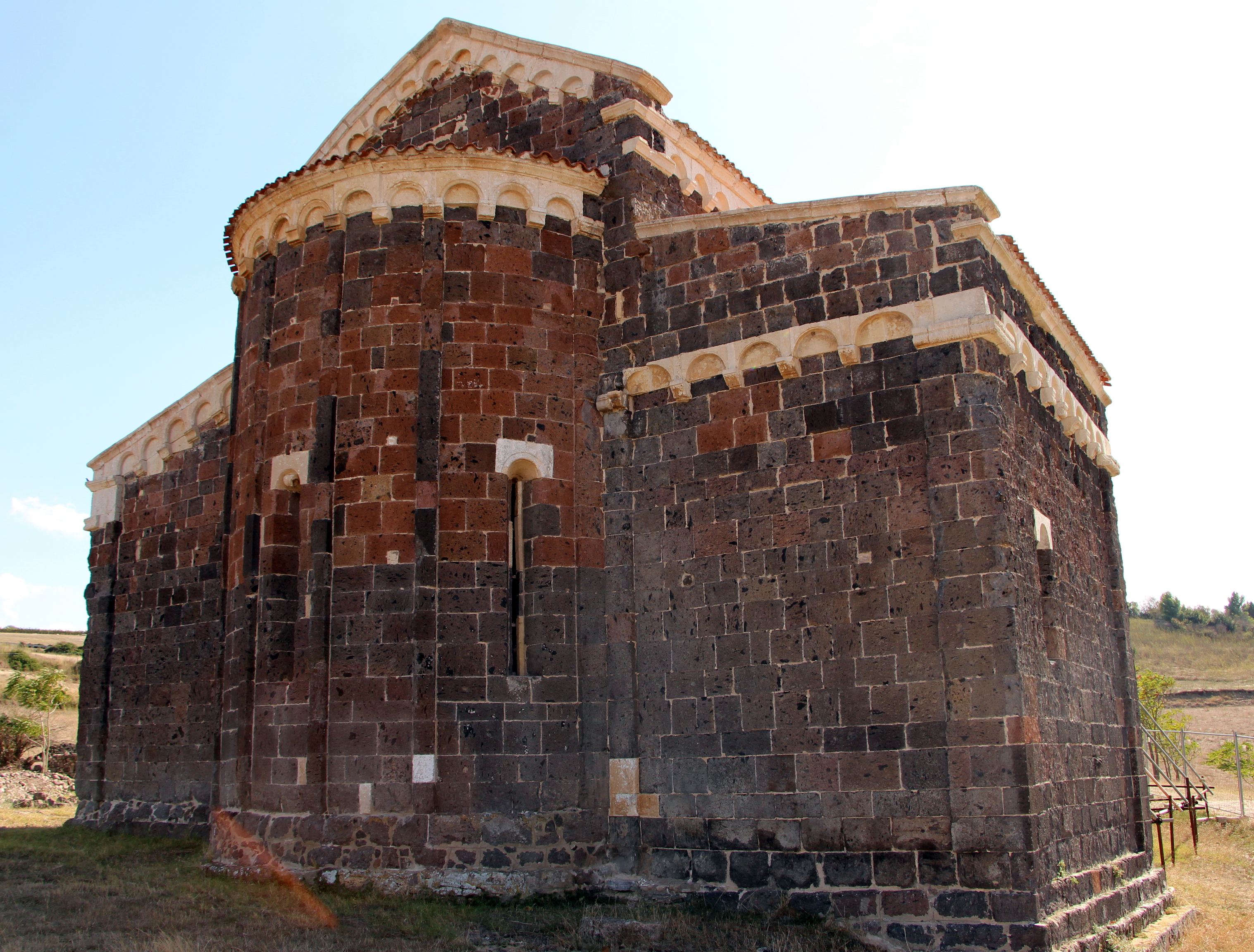 Bulzi (SS)